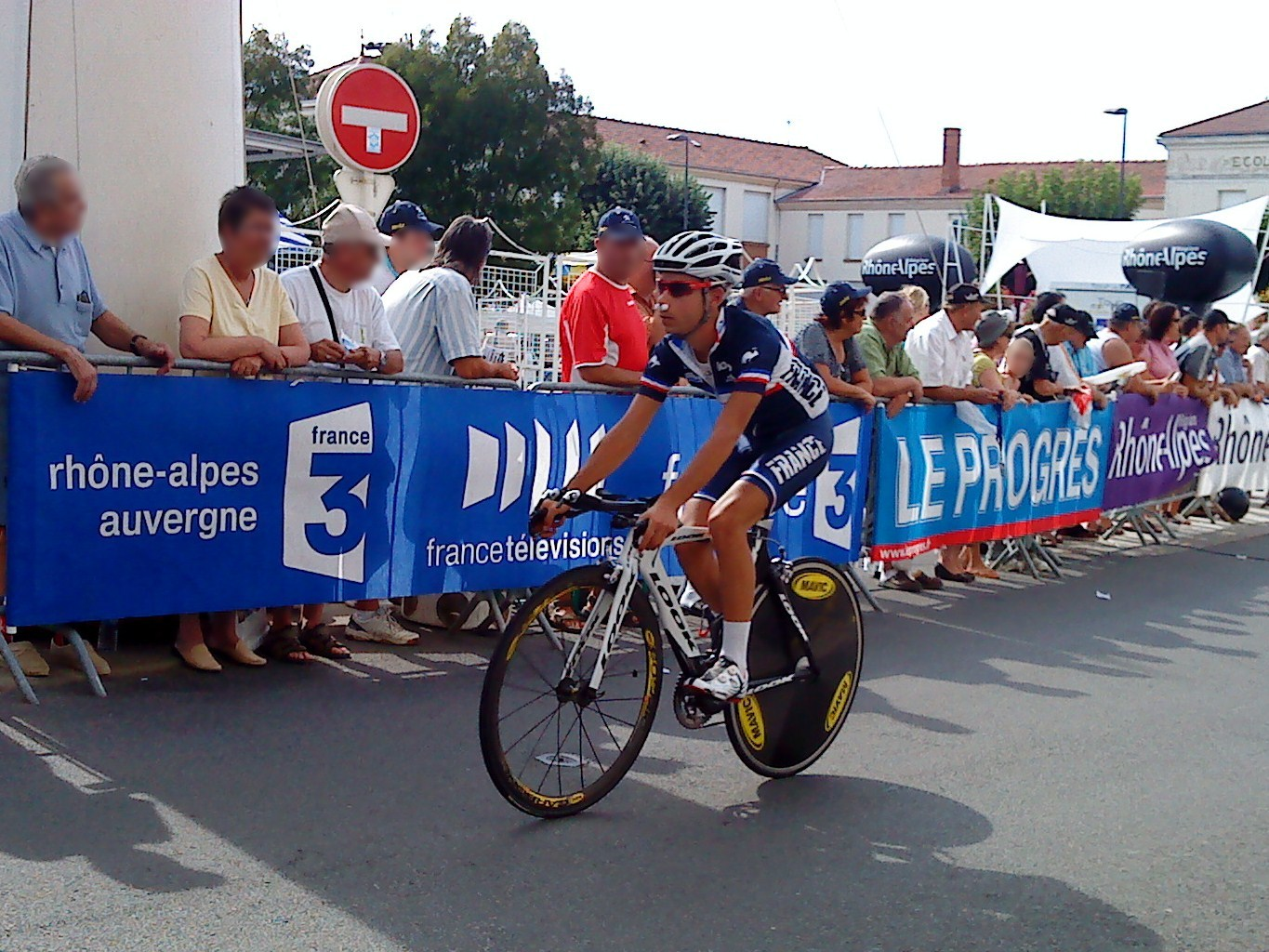 Thomas Bonnin avant le prologue du Tour de l'Ain 2010.